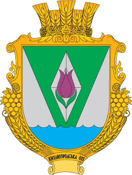 Герб Китайгородської ОТГ